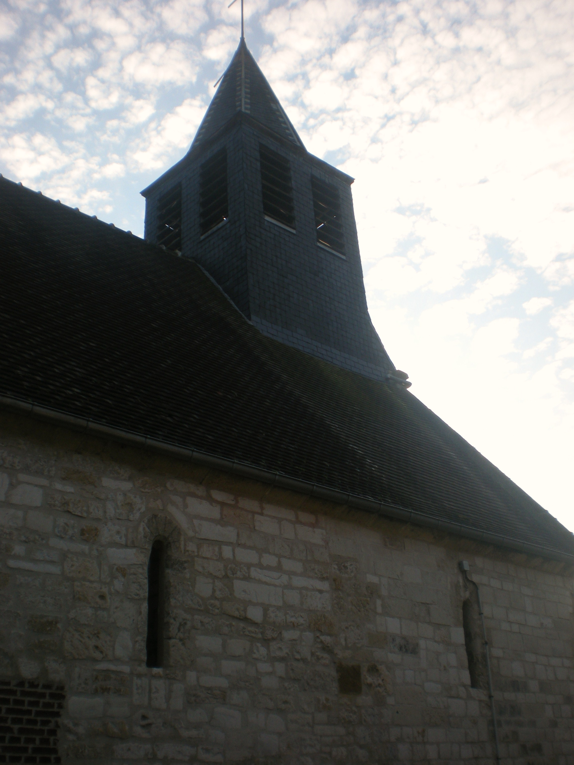 façade nord de l'église saint-aubin